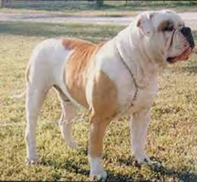 le célèbre ironman tyson